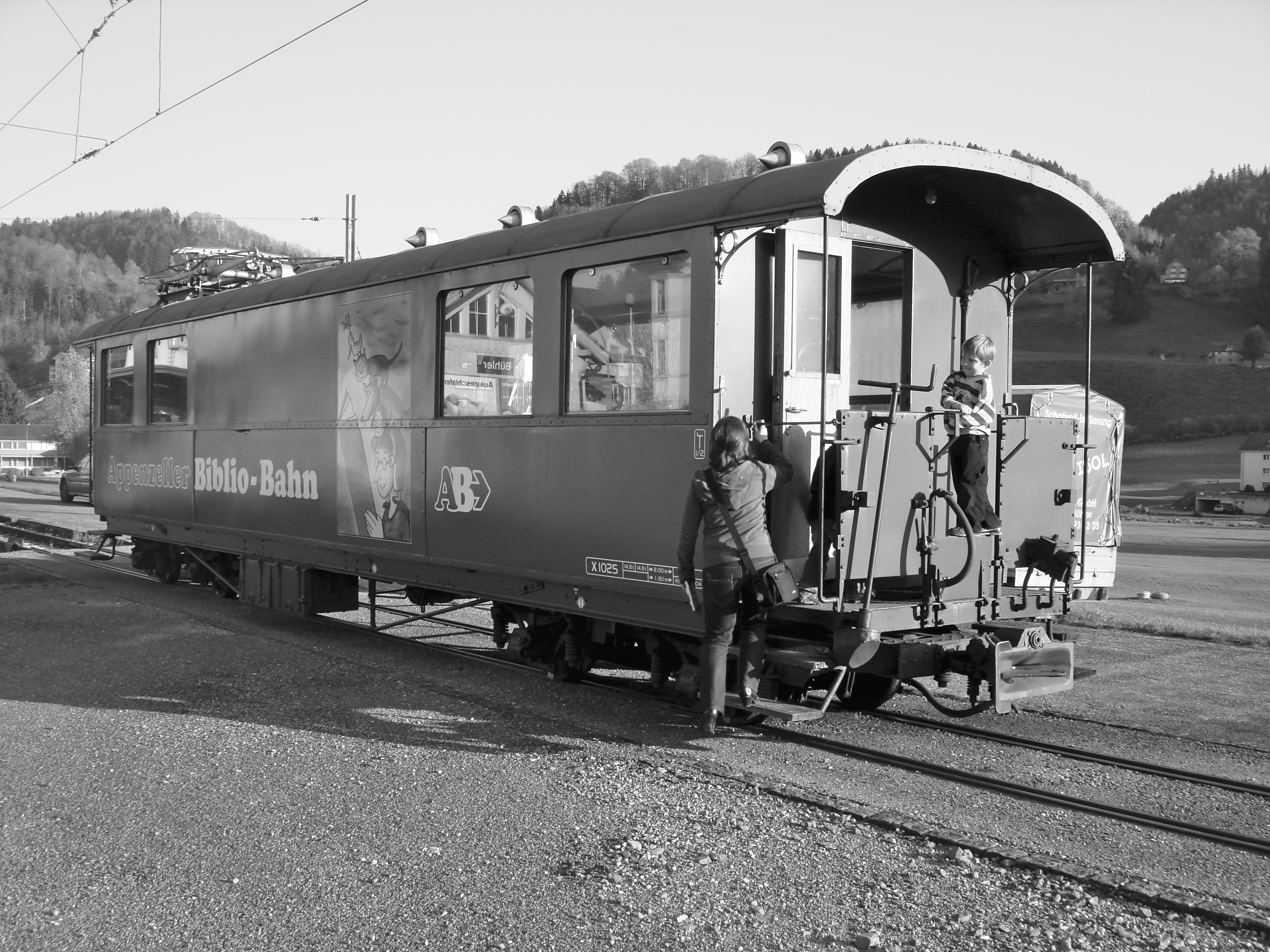 Wagen der Appenzeller Bibliobahn